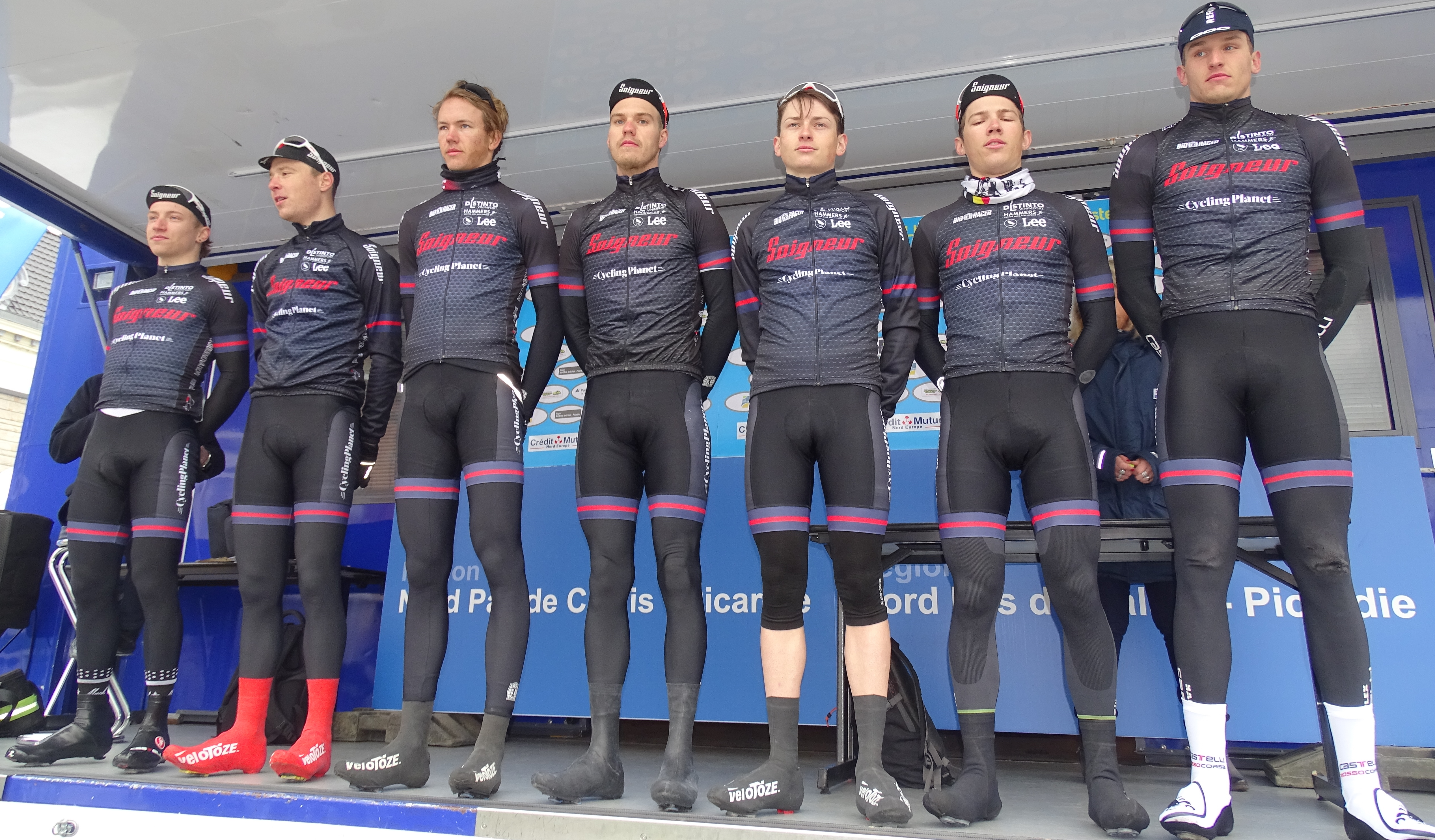 Reportage réalisé le dimanche 6 mars à l'occasion du départ et de l'arrivée du Grand Prix de Lillers-Souvenir Bruno Comini 2016 à Lillers, Pas-de-Calais, Nord-Pas-de-Calais, France.